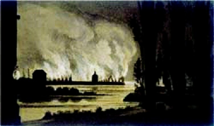 Ludwigshafen am Rhein brennt in der Nacht vom 15. auf den 16. Juni 1849 aufgrund der Kanonade der badischen Revolutionstruppen - Aquarell von Franz Artaria